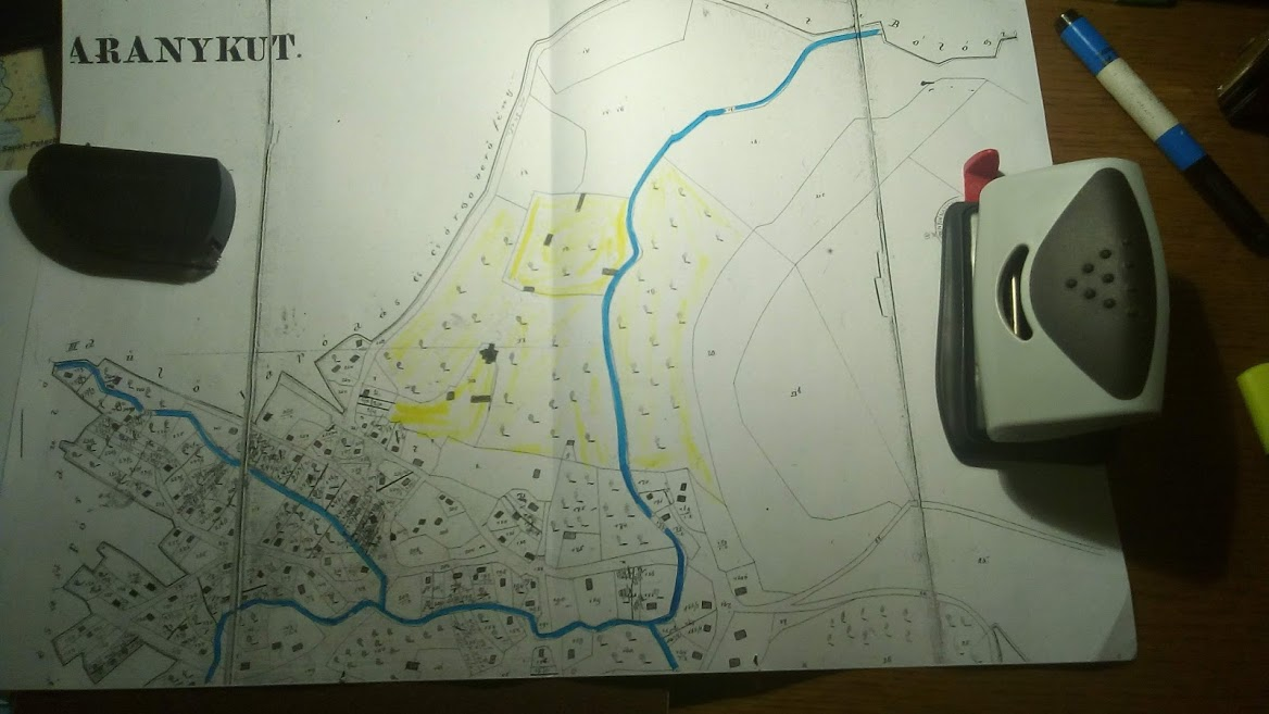 Harta topografica a comunei Aruncuta { Aranykut } ,perioada 1867-1918